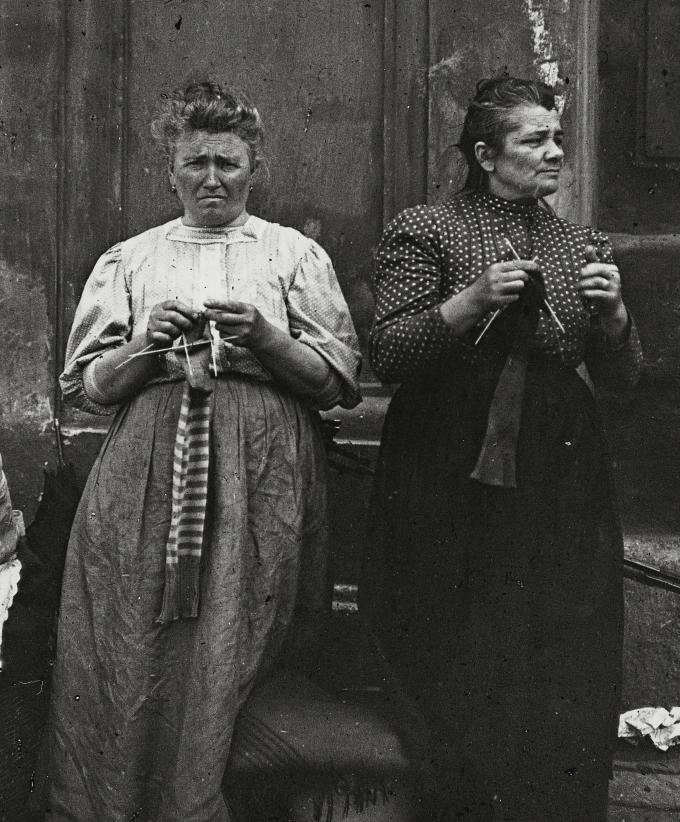 Wartende, strickende Frauen bei der "Reibfrauen"-Börse (Börse arbeitsloser Frauen für einfache Haushaltsdienste), bei der Kirche Am Hof, Photographie aus Wien